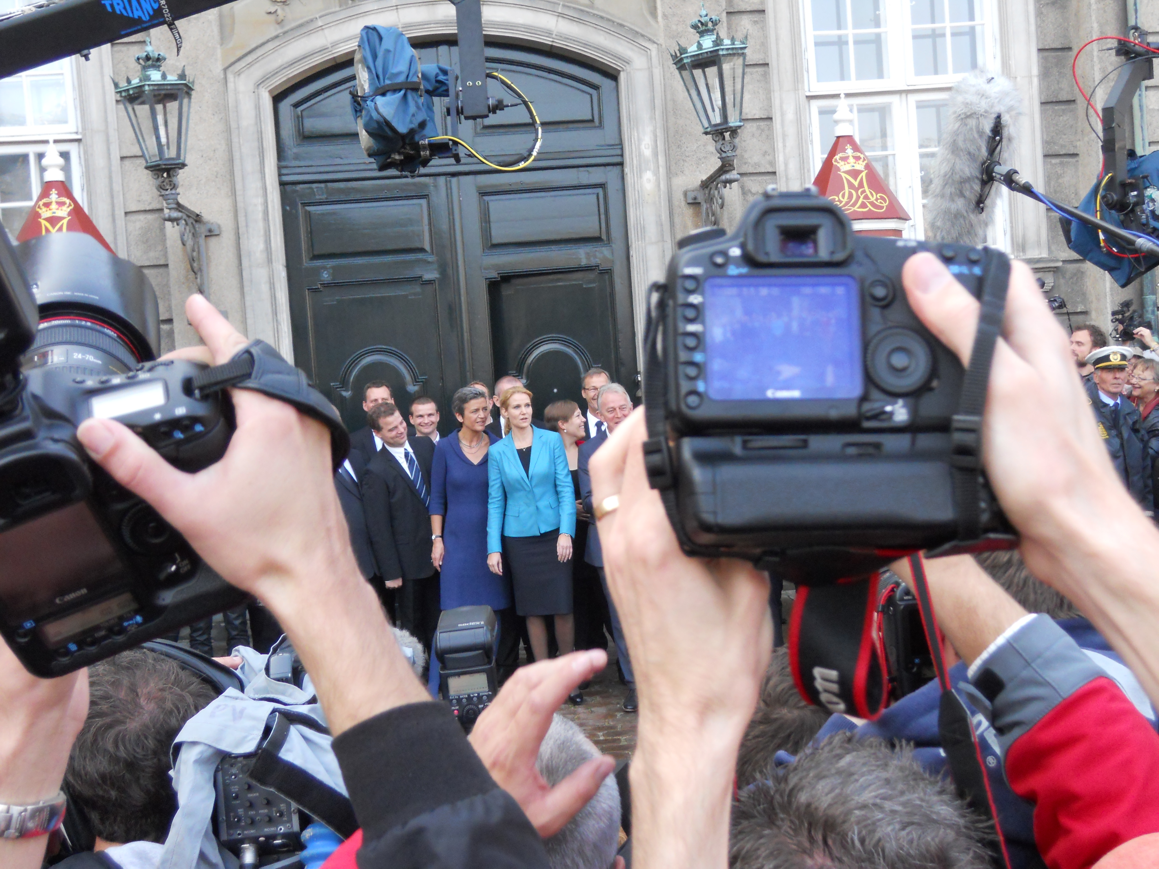 Regeringen Helle Thorning-Schmidts tiltrædelse.